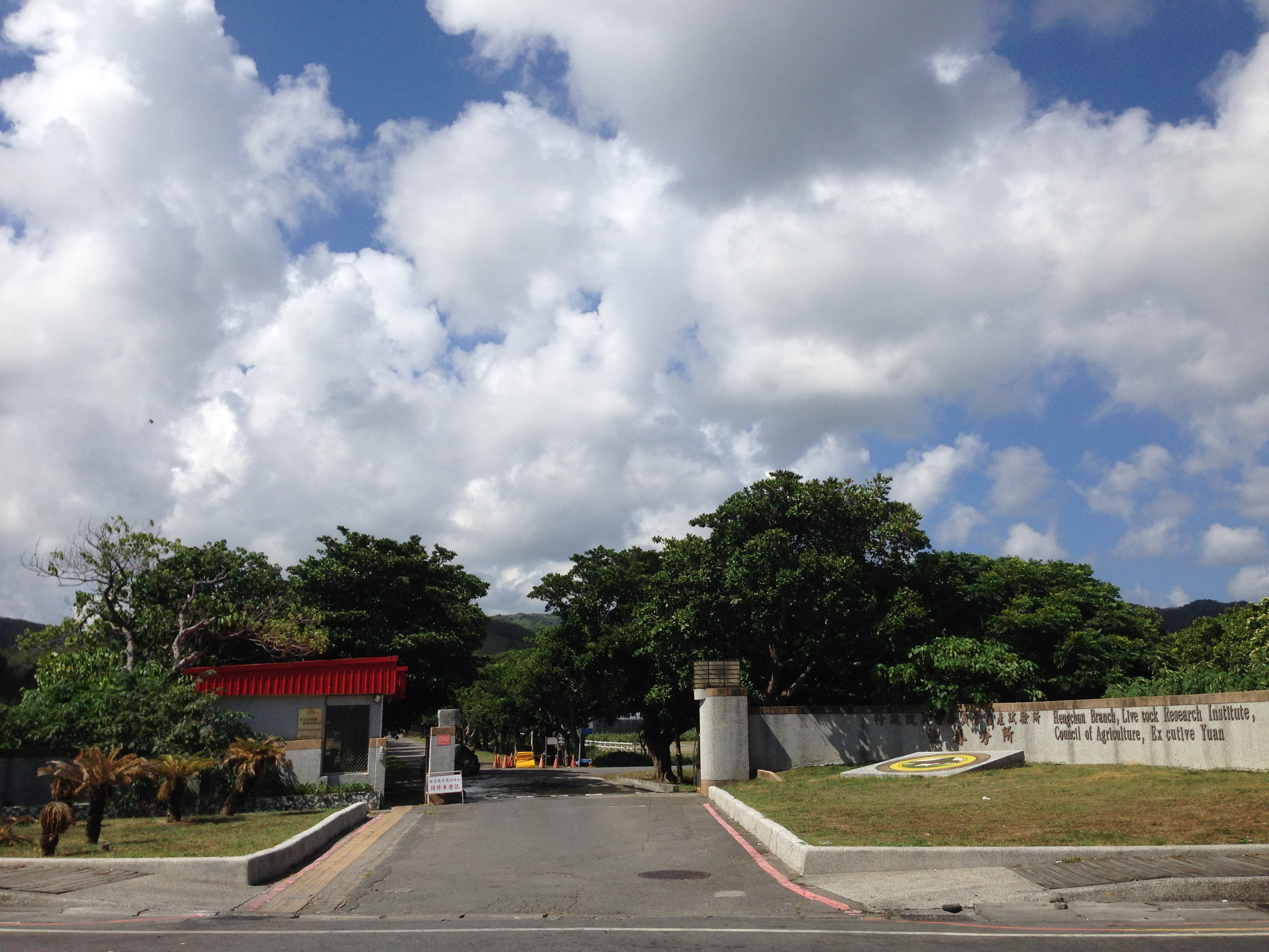 中文（台灣）: 行政院農業委員會畜產試驗所恆春分所。